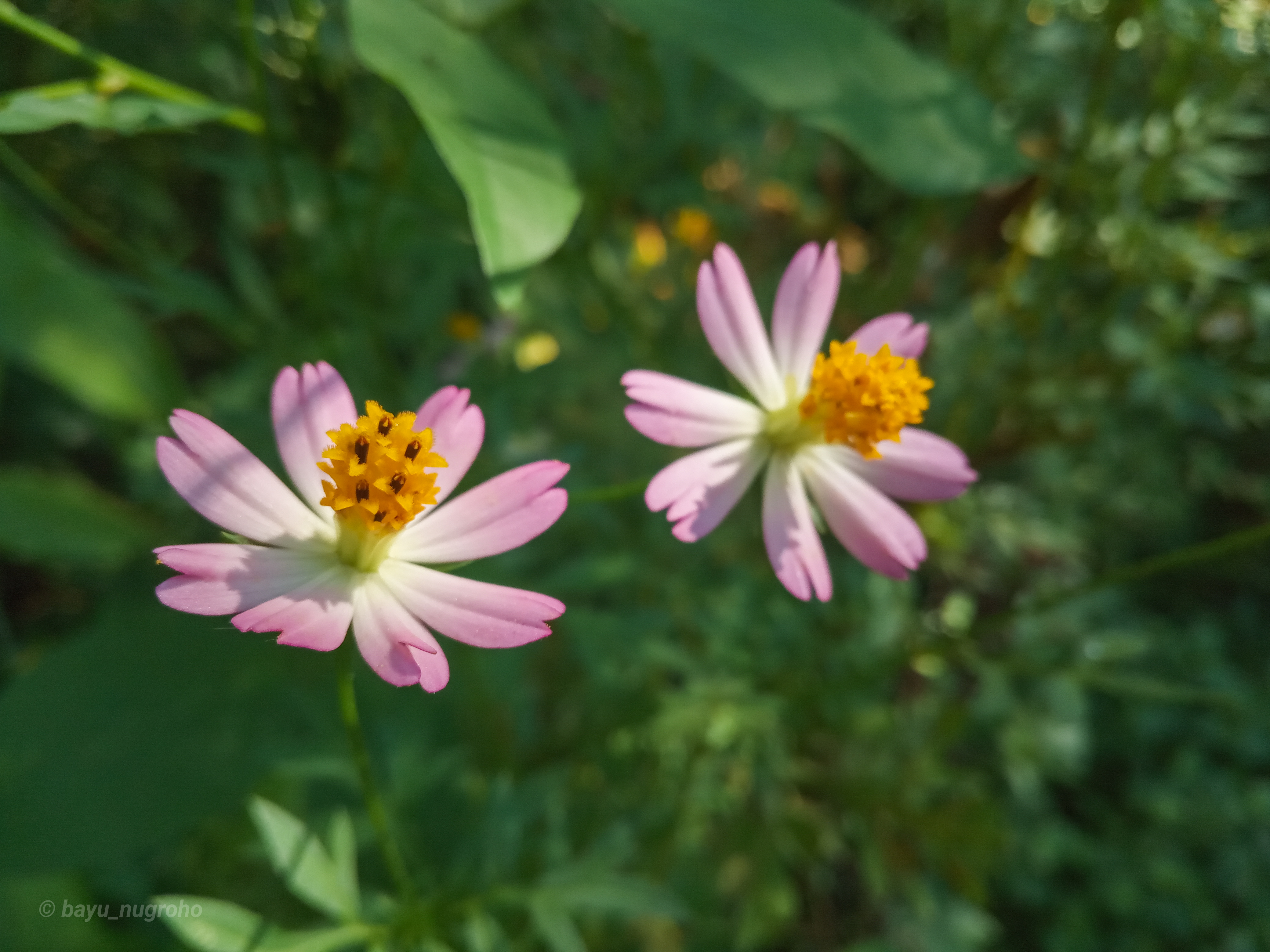 Bunga kenikir merah